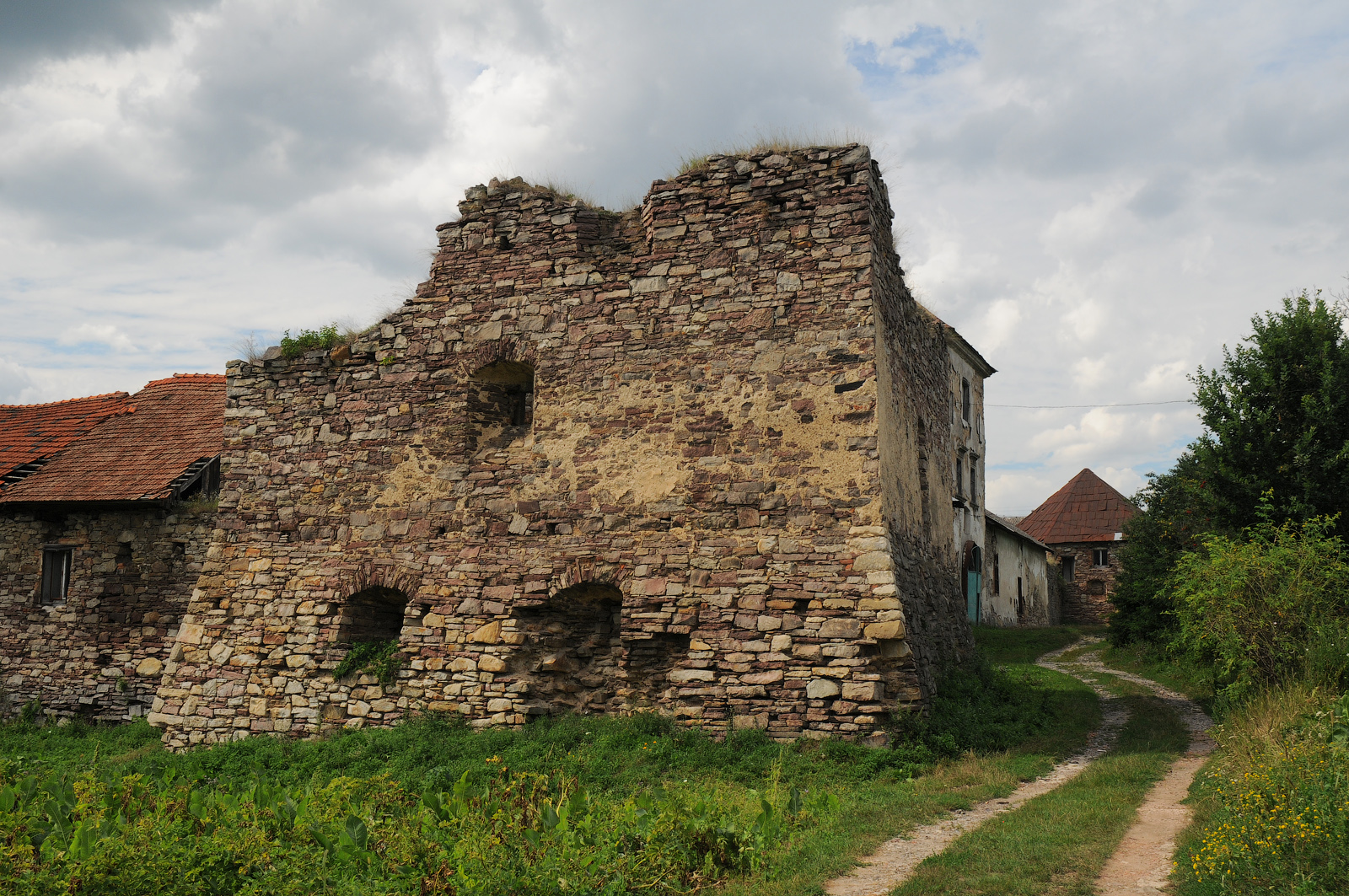 Замок в Золотому Потоці